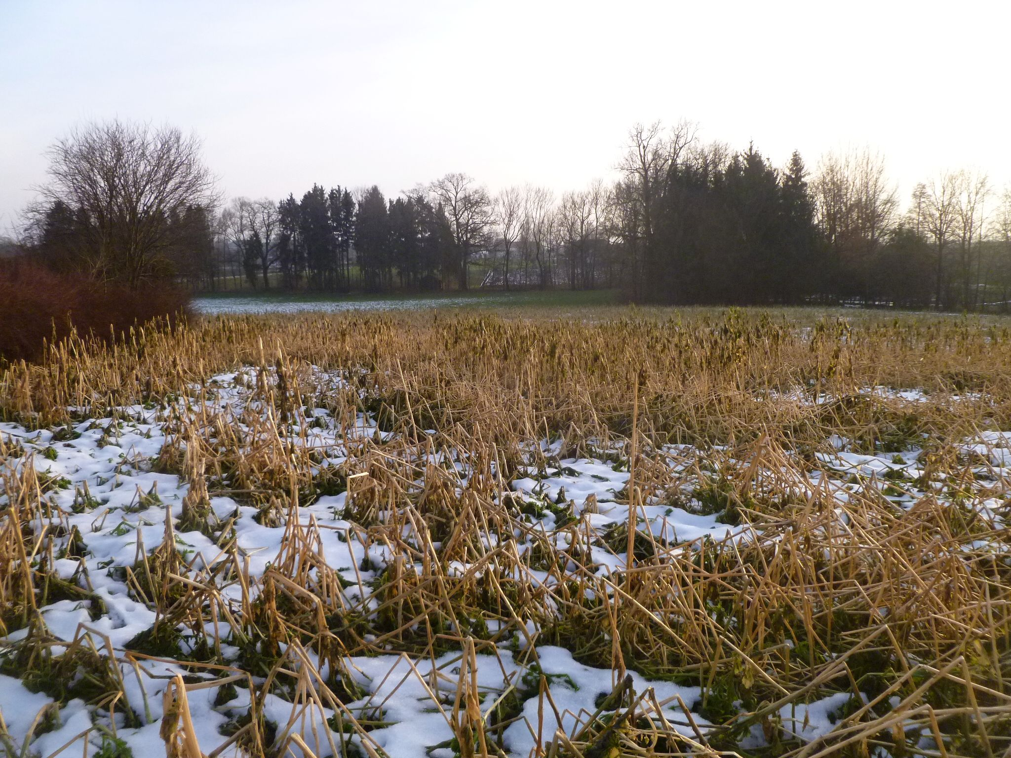 Rohr (Rottal) - Schlosswiese in Unterrohr